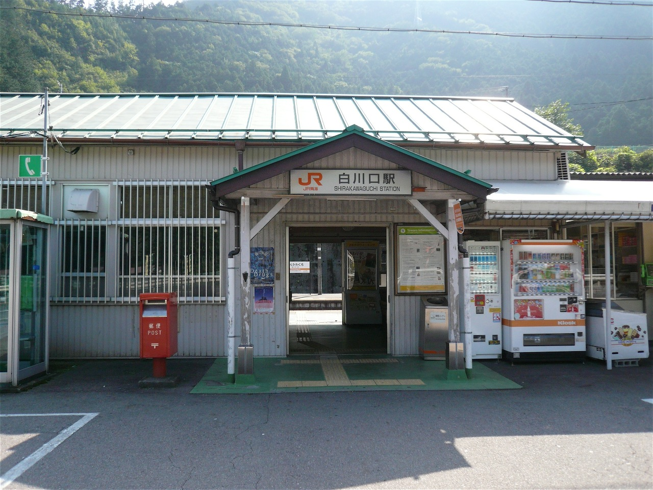 白川口駅の駅舎。（2007年9月3日撮影 撮影者…Nao0000）